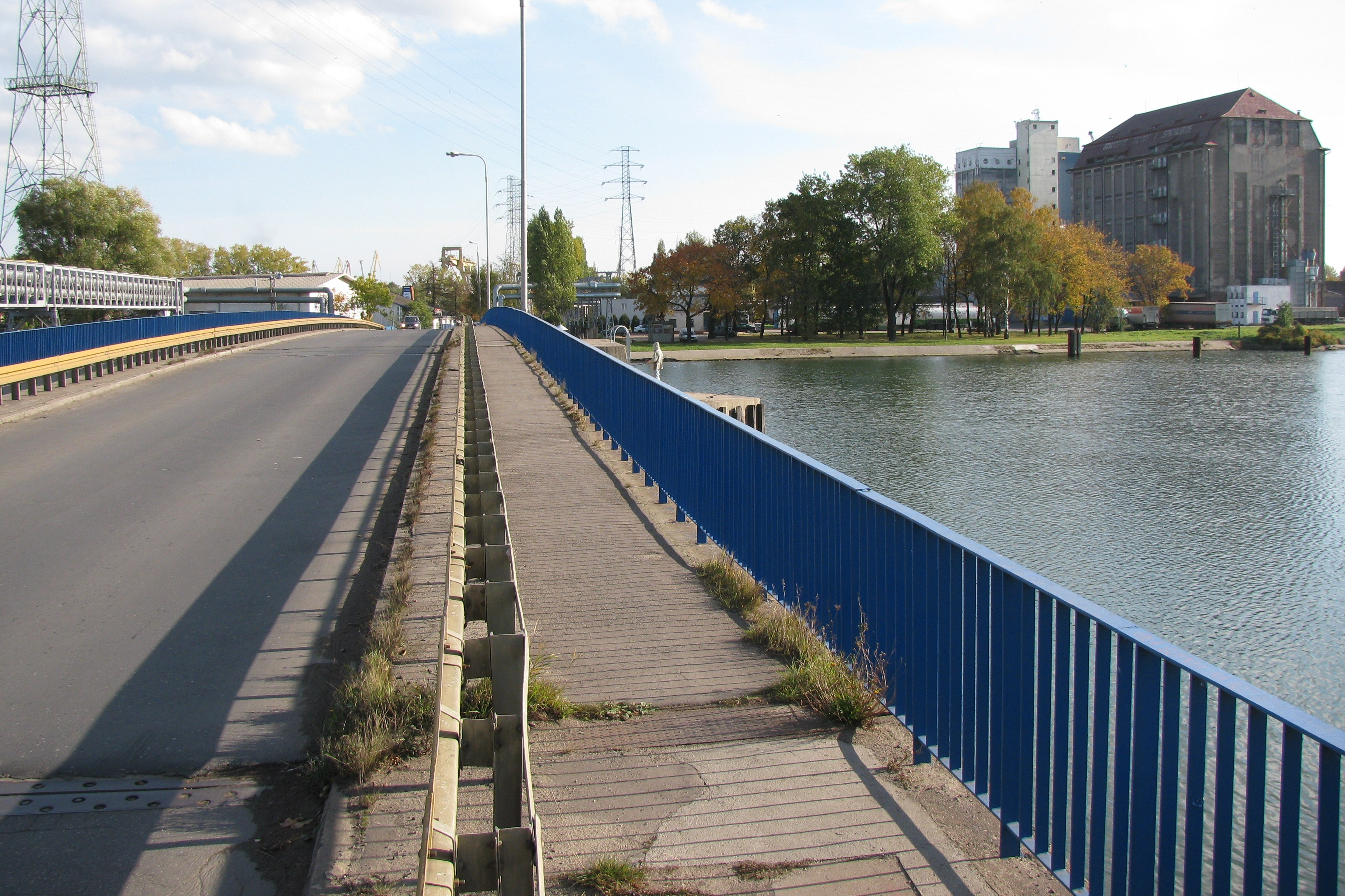 Gdańsk Młyniska, most zachodni na wyspę Ostrów (w tle).